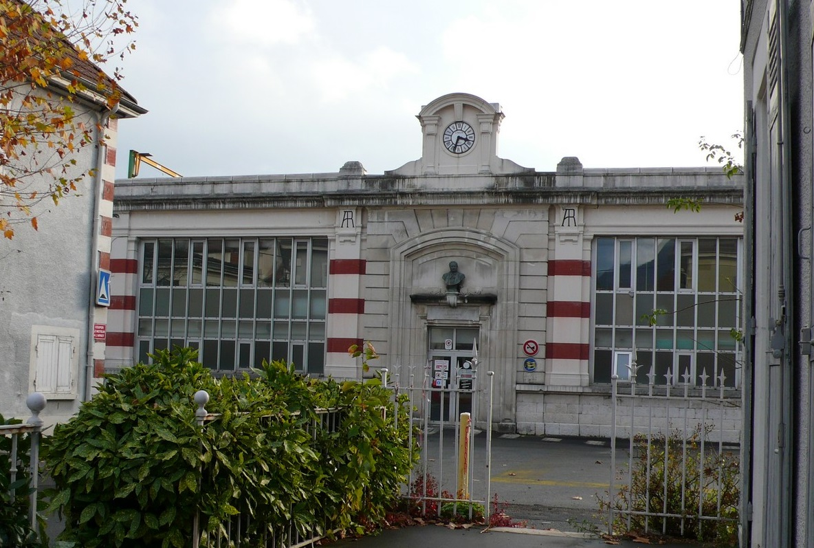 Entrée des ateliers historiques désaffectés depuis leur transfert en 2014. Au dessus de la porte d'entrée, buste du fondateur et propriétaire de l'entreprise, Albert-Pierre Raymond.